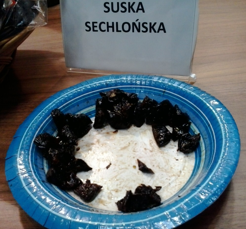 Suska sechlońska na targach Smaki Regionów, Poznań, 2014r.